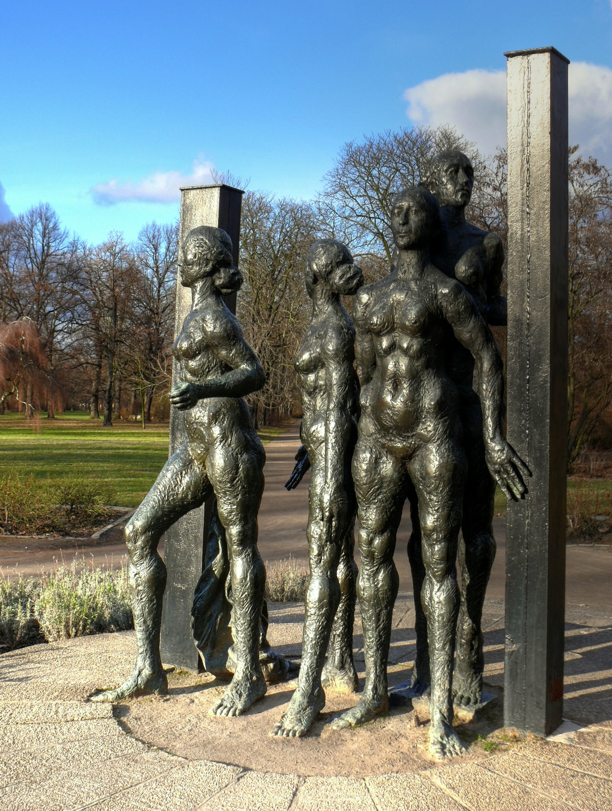 Bronzeskulptur Studentinnen von Irene Marquardt im Friedenspark Leipzig